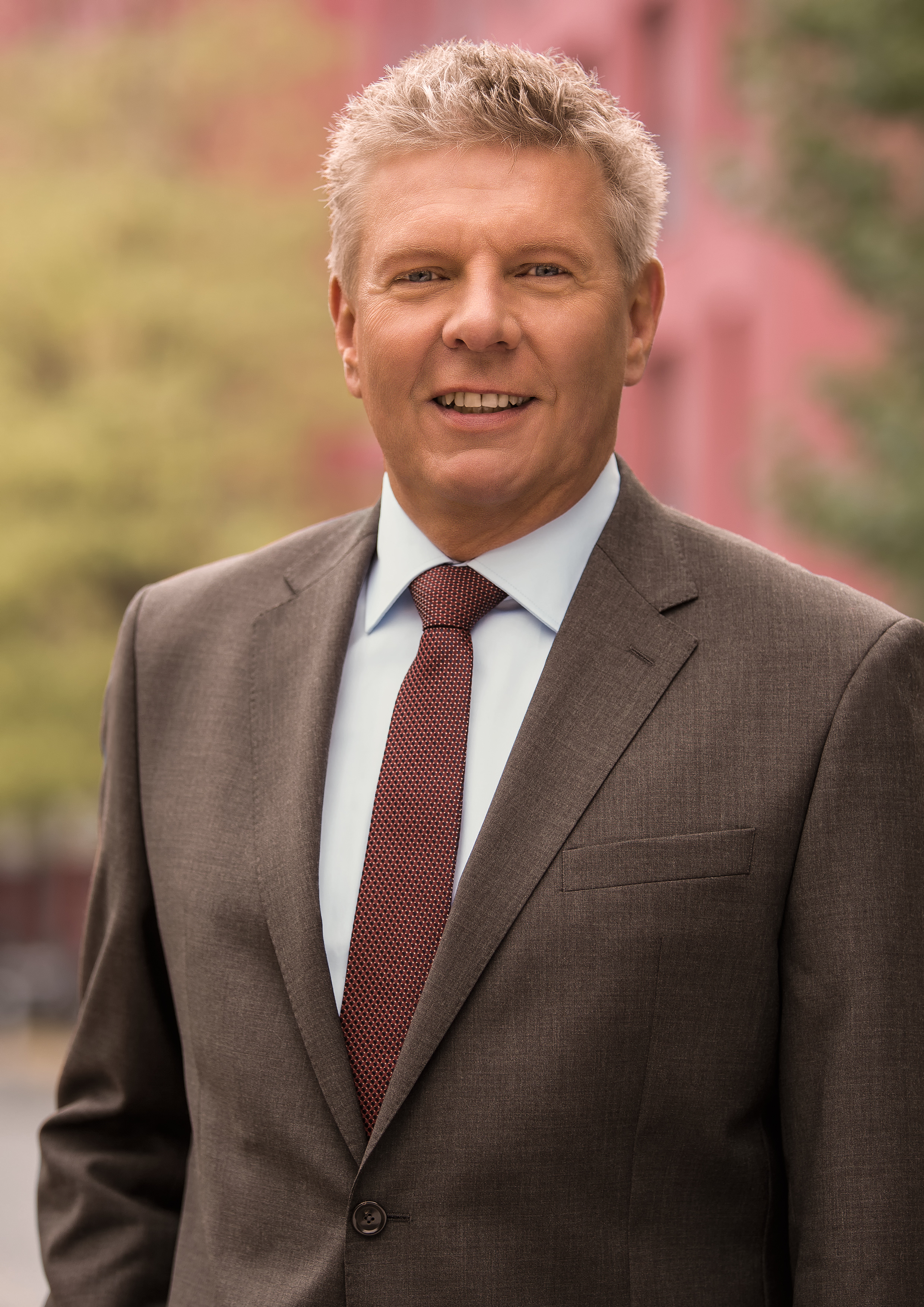 Dieter Reiter, Oberbürgermeisterkandidat der SPD in München, Bayern, zur Kommunalwahl 2014